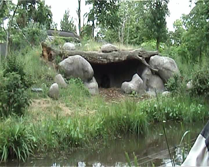 Blijdorp gorilla-island